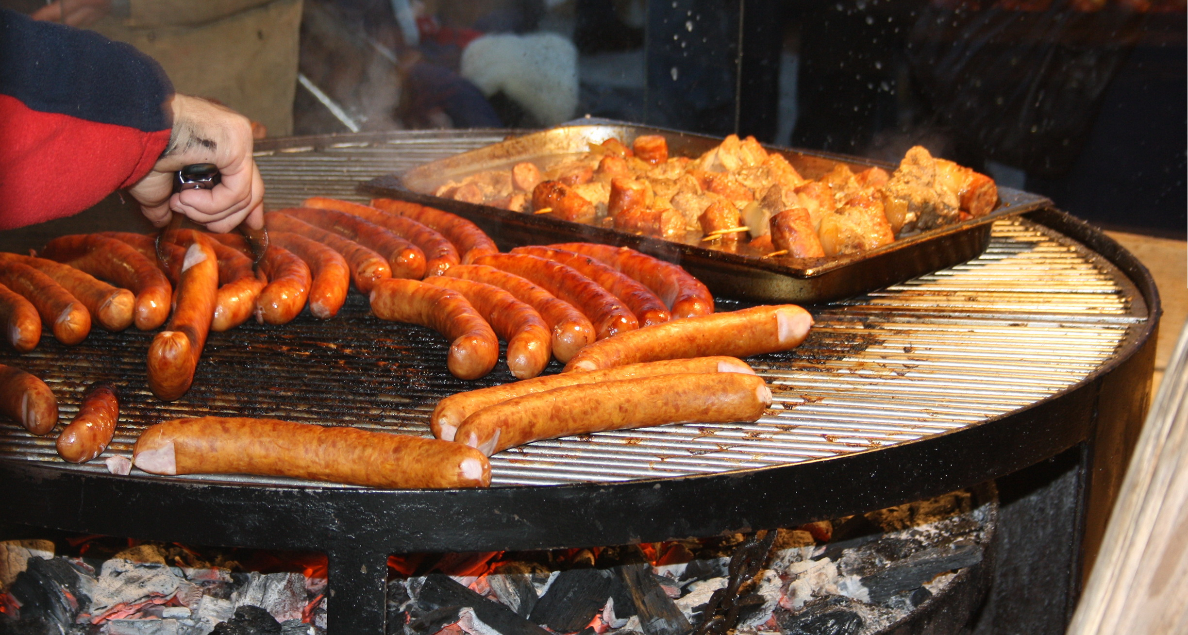 Grill auf in einem Stand mit polnischen Spezialitäten auf einem Weihnachtsmarkt. Belegt mit Grillwürstchen und einer Schale mit Schaschlik.